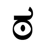 ттхакараву